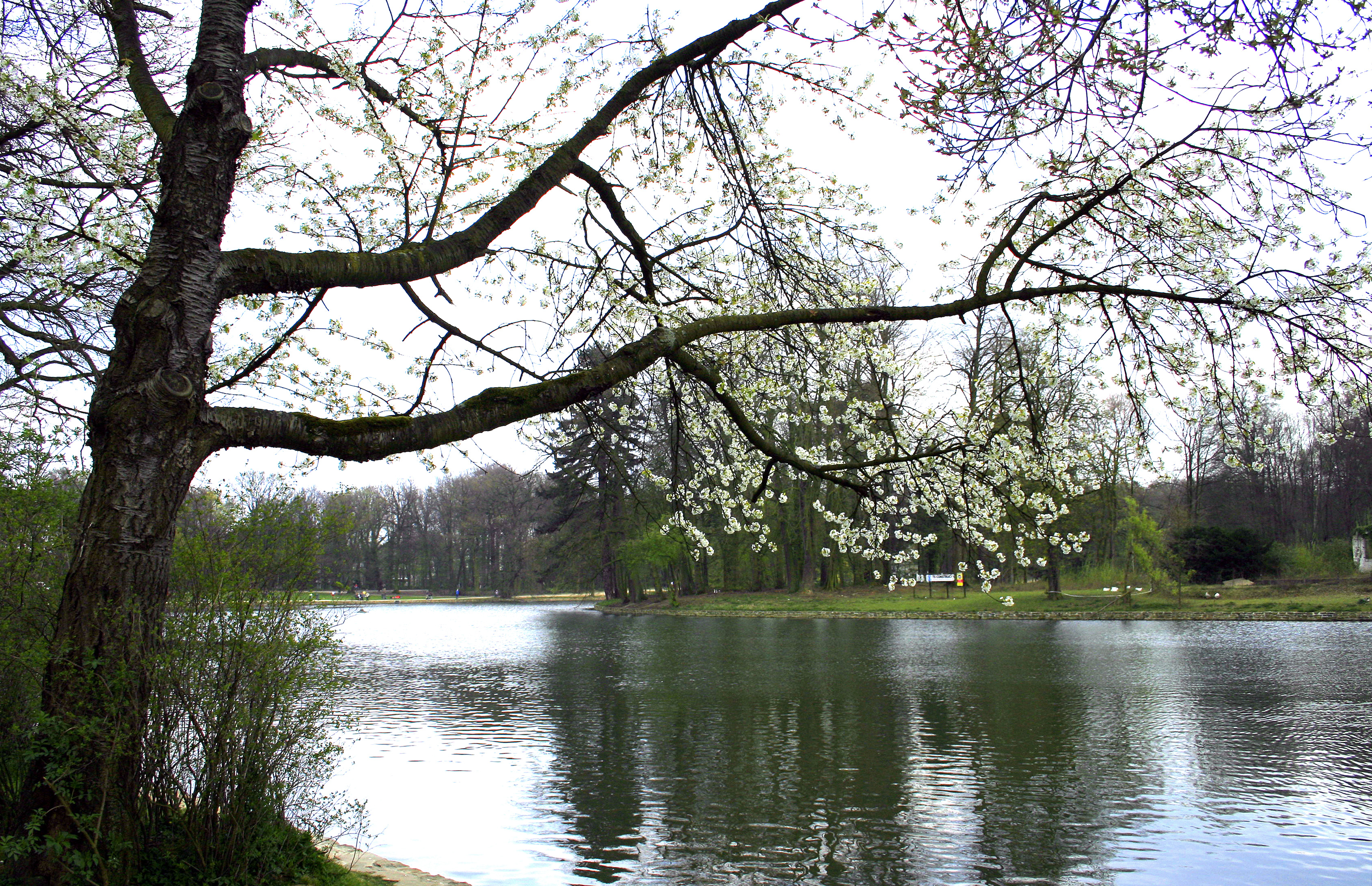 Bruxelles (Belgique), l'étang du Bois de la Cambre. Merisier (Prunus avium) en fleurs - Circonférence mesurée à 1m50 du sol: 215 cm - (2007).